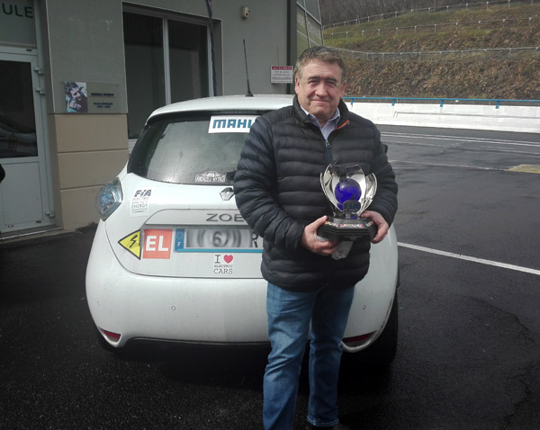 Didier Malga avec le trophée FIA et la Renault Zoé championne du Monde